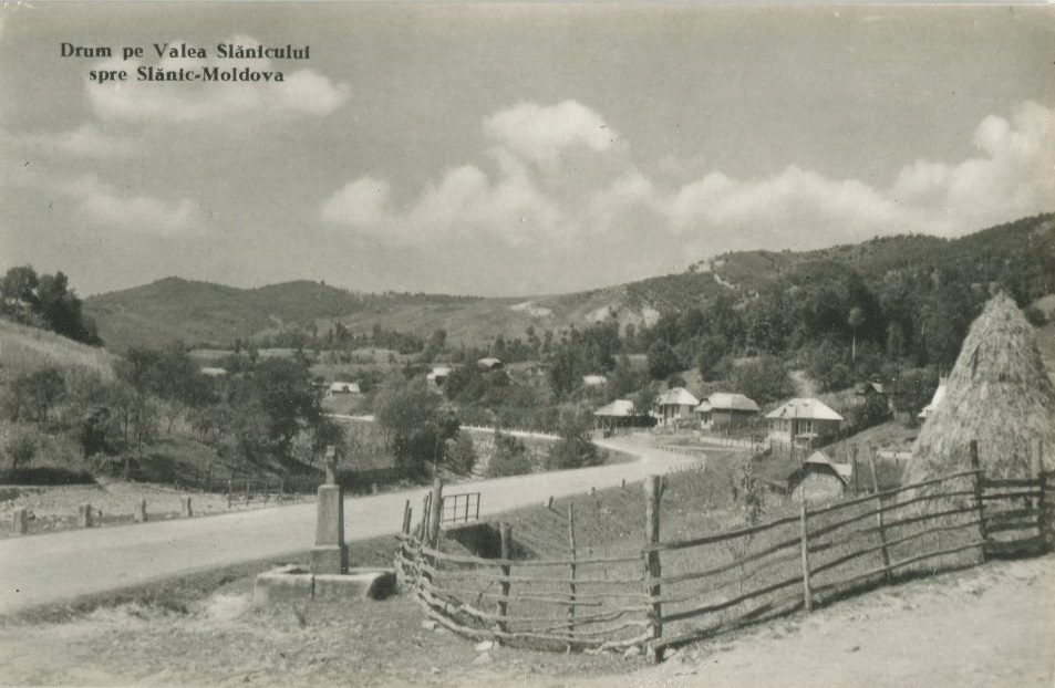 Perspectivă asupra satului Cireșoaia din localitatea Slănic Moldova.